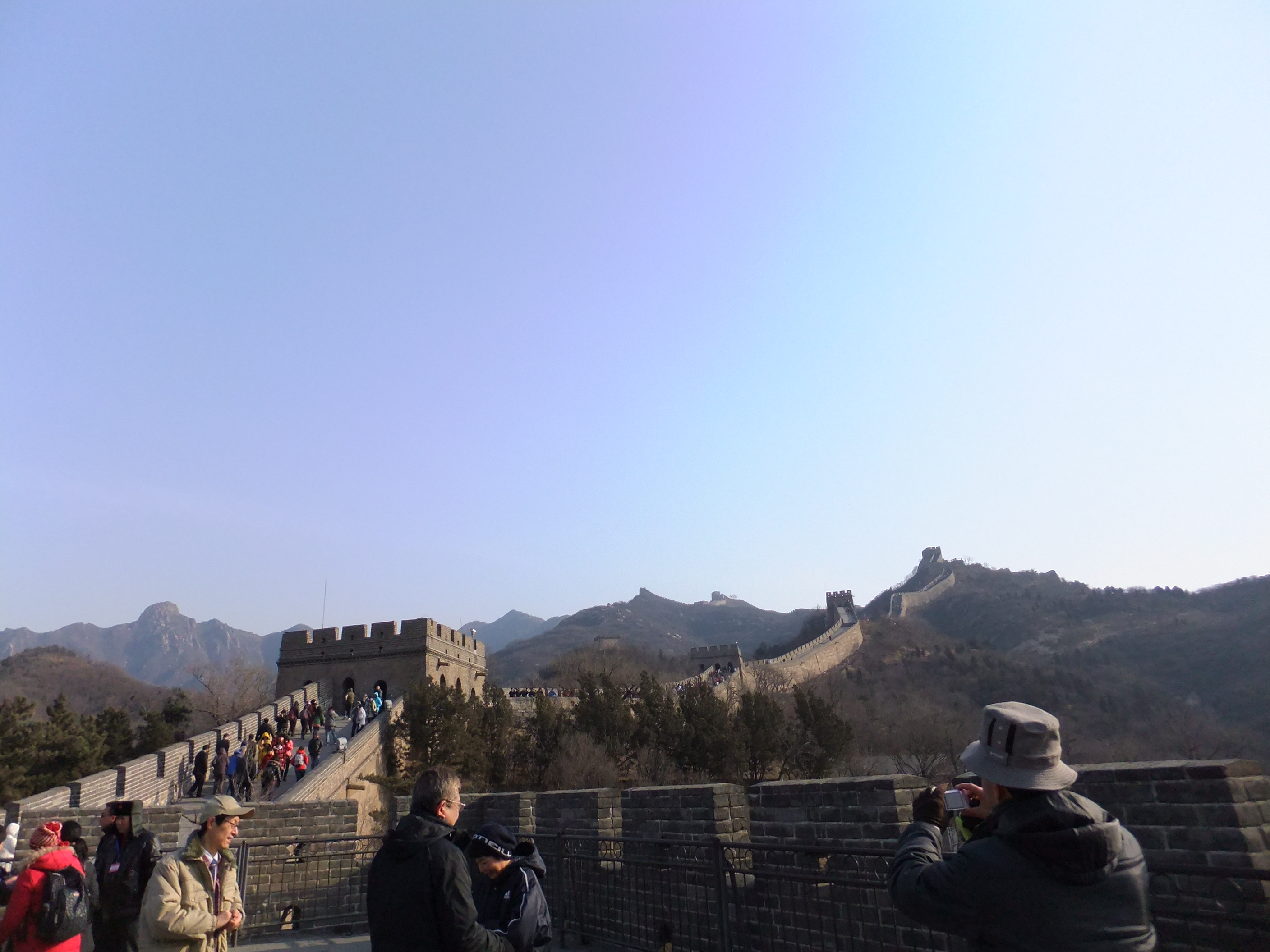 万里の長城八達嶺長城